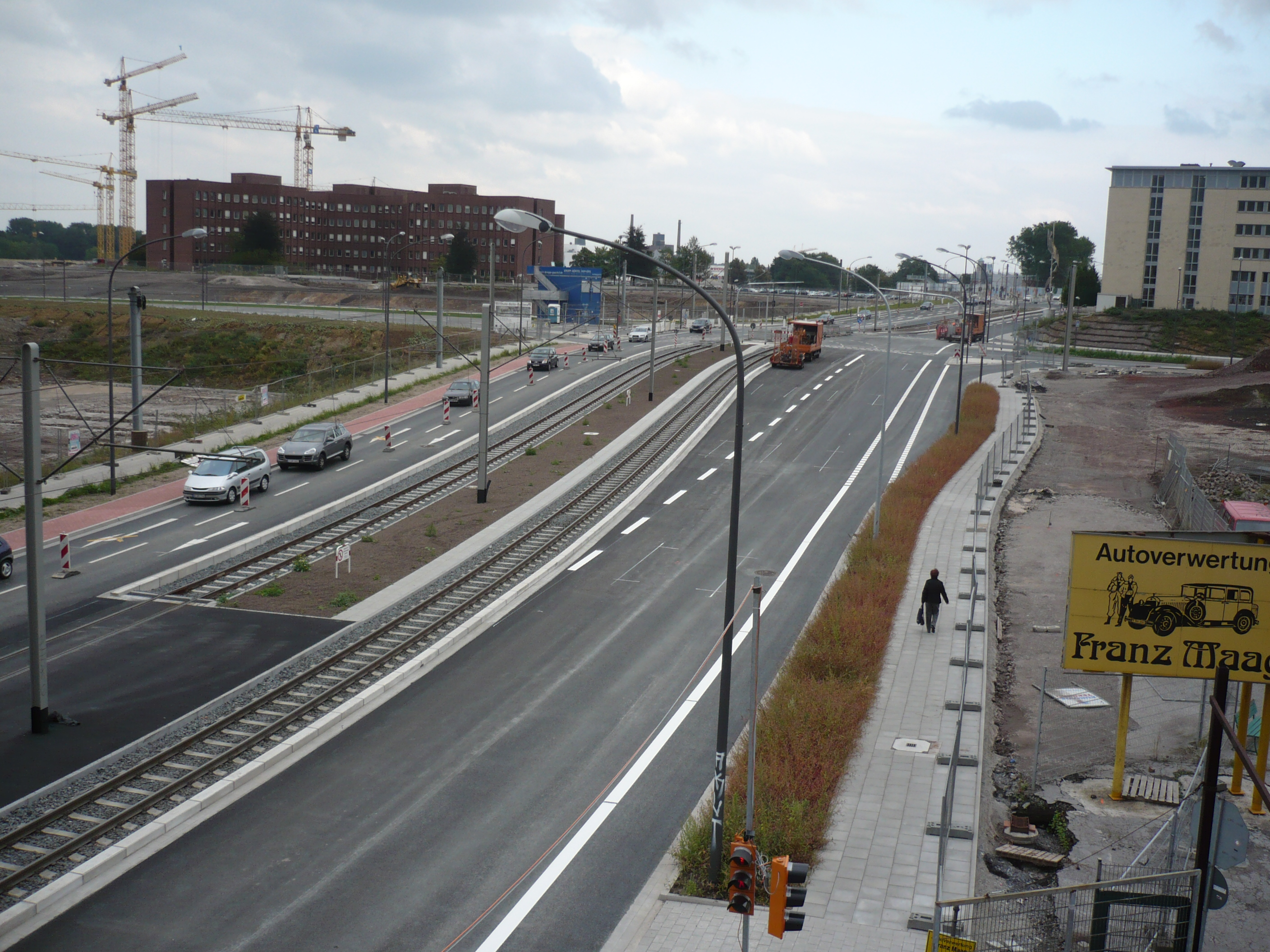 Altendorfer Straße, Berthold-Beitz-Boulevard in Essen